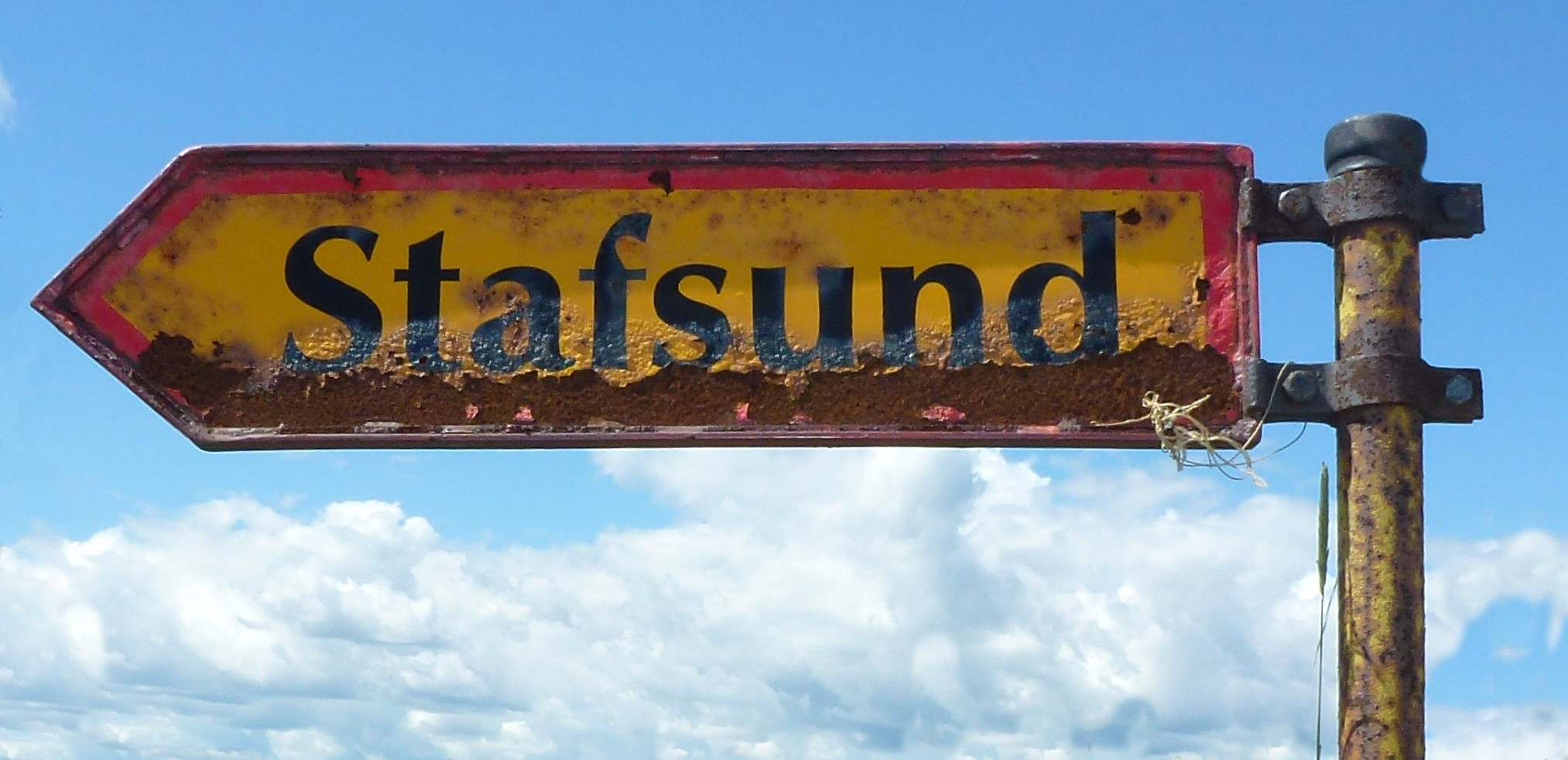 Stafsund skylt